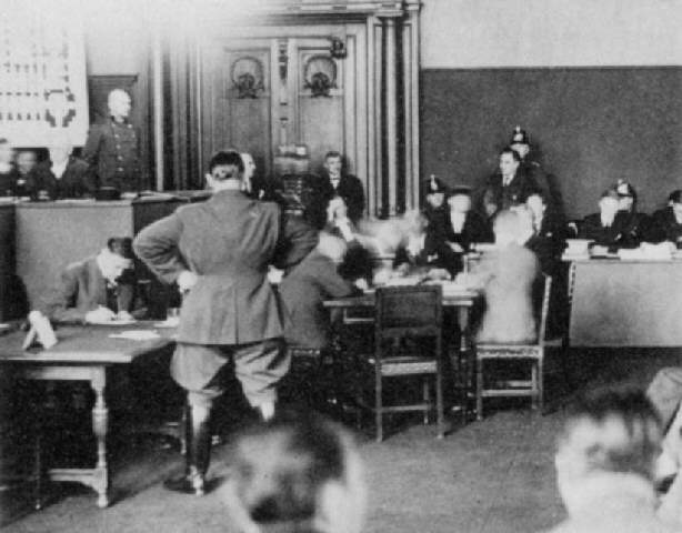 Hermann Goering, de espaldas, durante el juicio por el incendio del Reichstag, 1933.